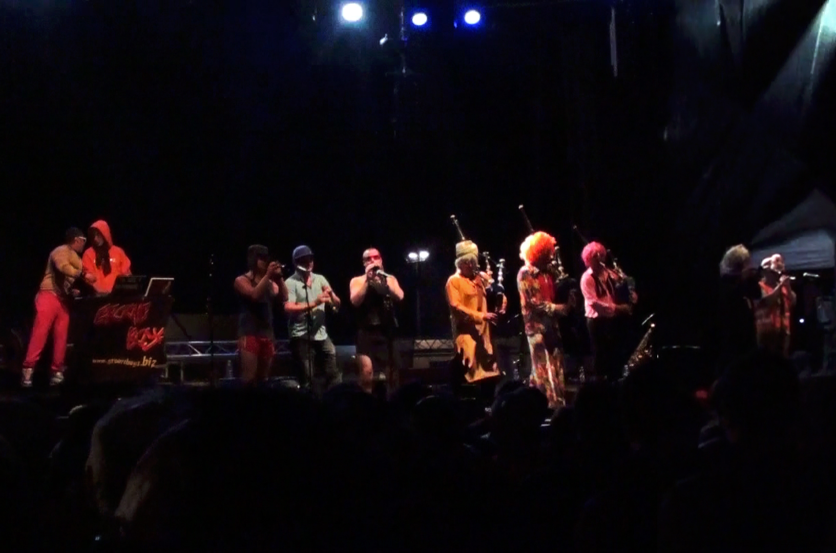 Les Groove Boys lors du festival des Filets bleus 2012 à Concarneau.